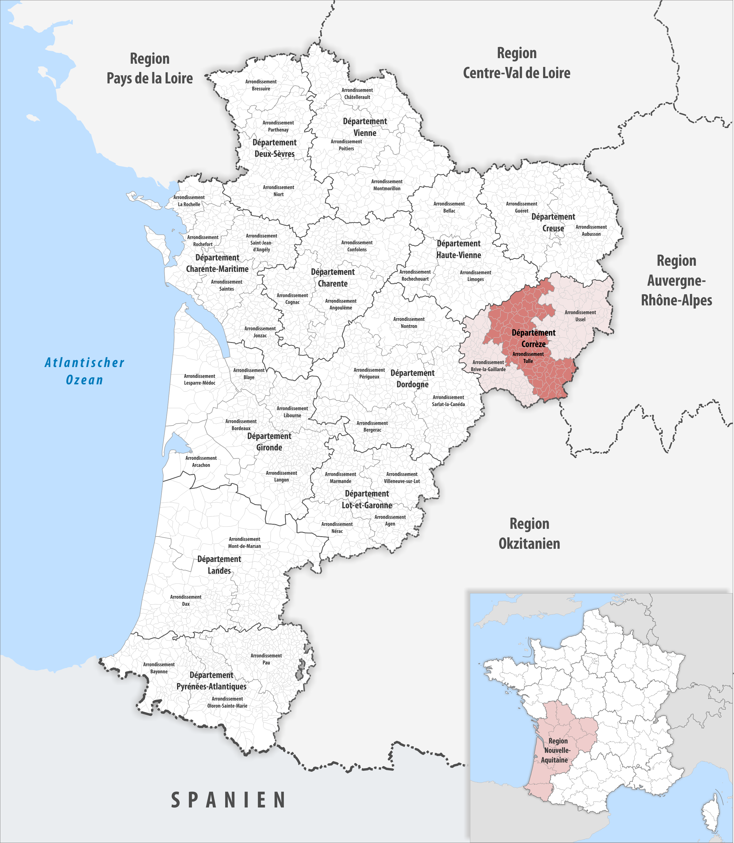 Lage des Arrondissements Tulle